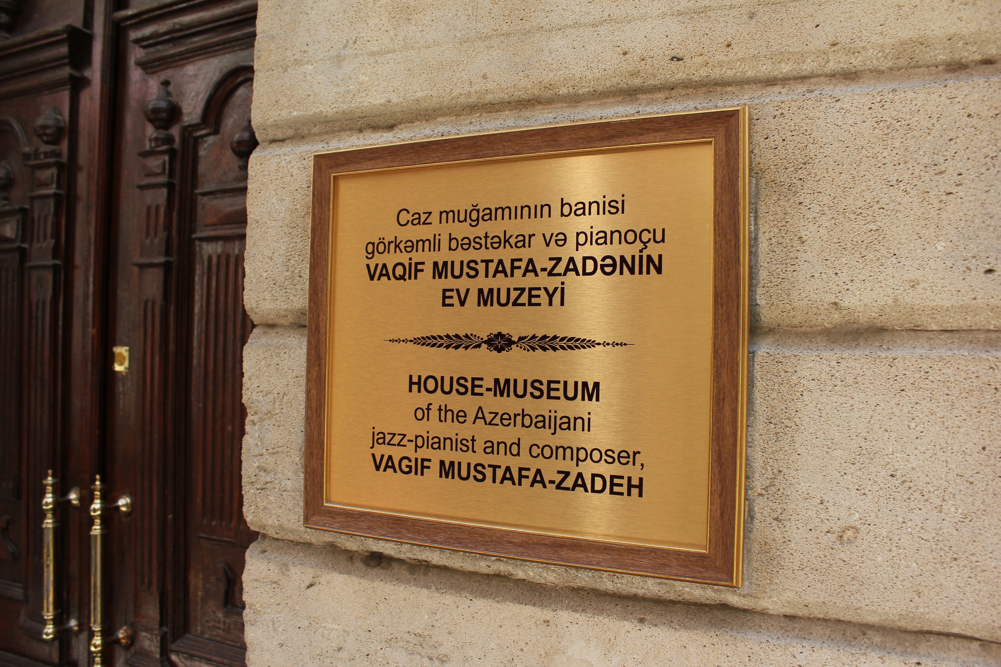 Табличка дома-музея азербайджанского джазового композитора и пианиста Вагифа Мустафазаде.